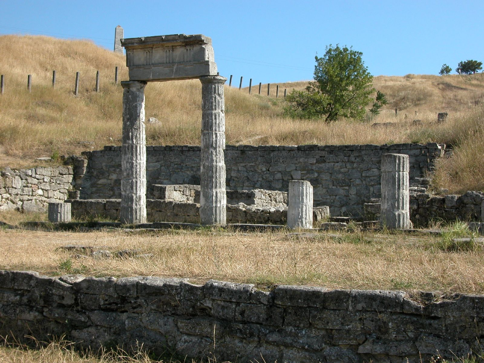 Пантикапей в Керчи